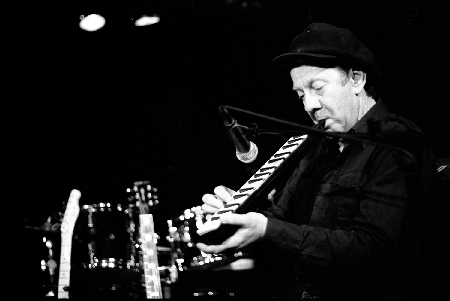 Eyeless in Gaza (Berlin)